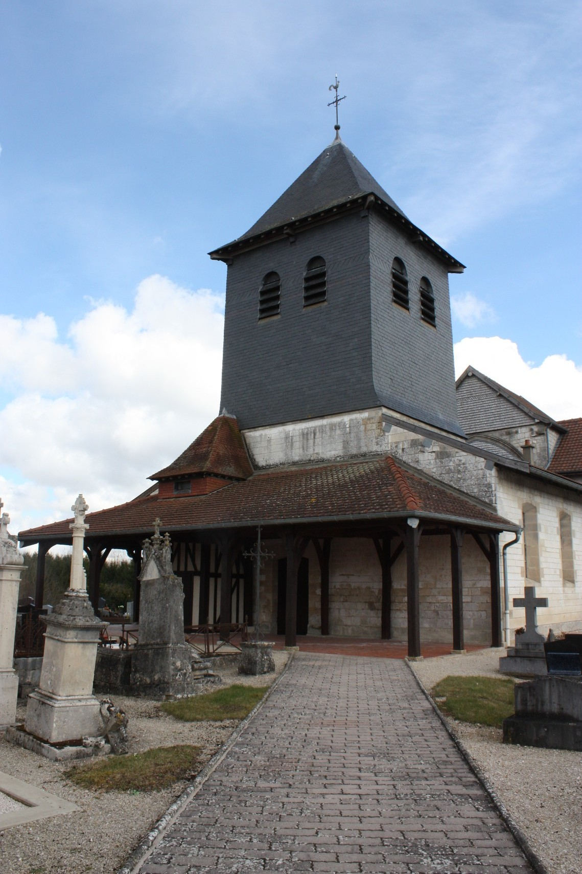 Église Saint-Denis de Courdemanges (Inscrit) .